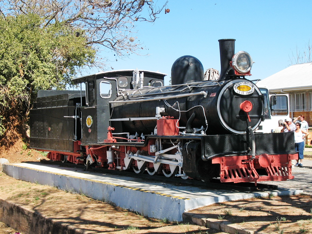 Alte Schmalspurlokomotive beim Bahnhof Otjiwarongo